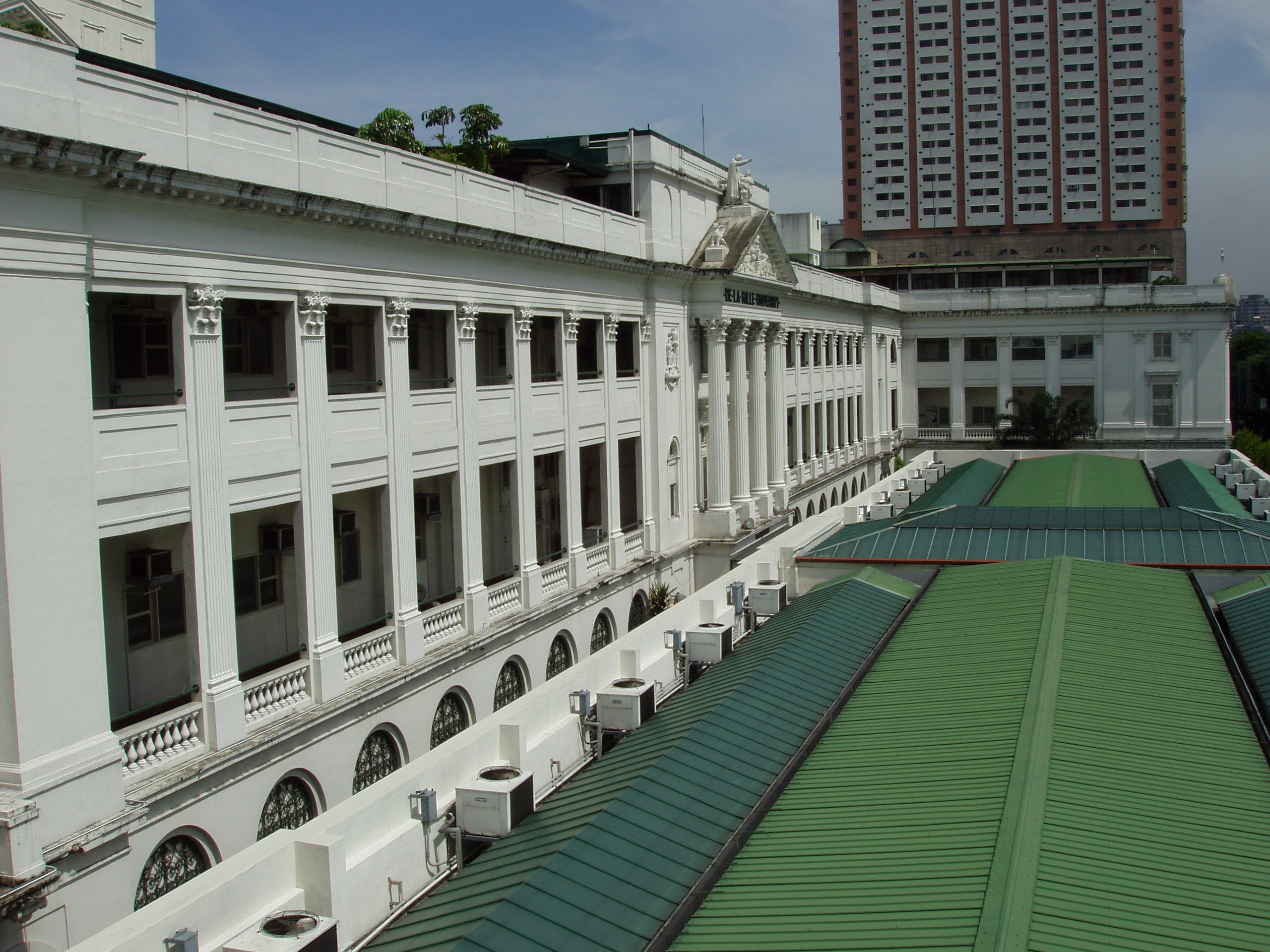 Tagalog: St. La Salle Hall of DLSU-Manila.